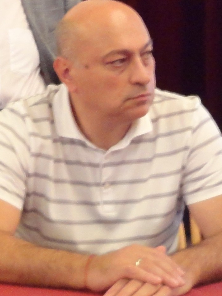 Zurab Azmaiparashvili, Vienna Chess Open 2015 in Wien.